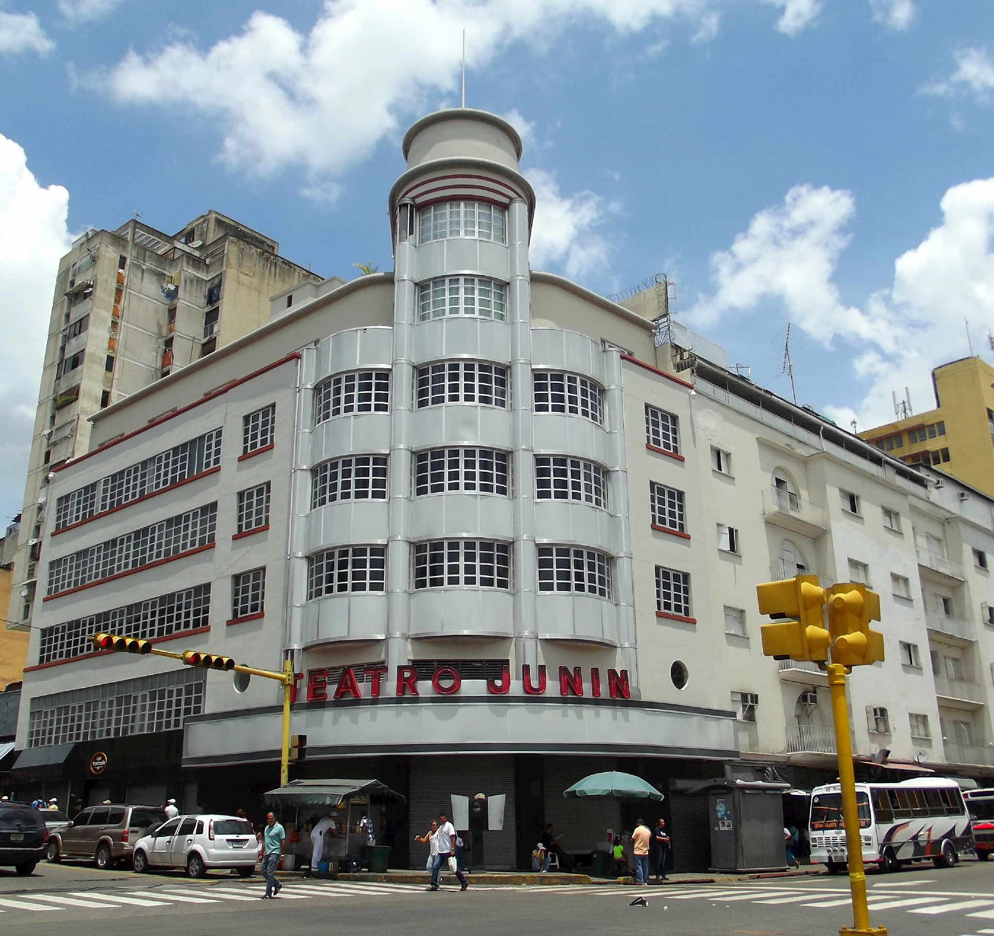 Teatro Junín